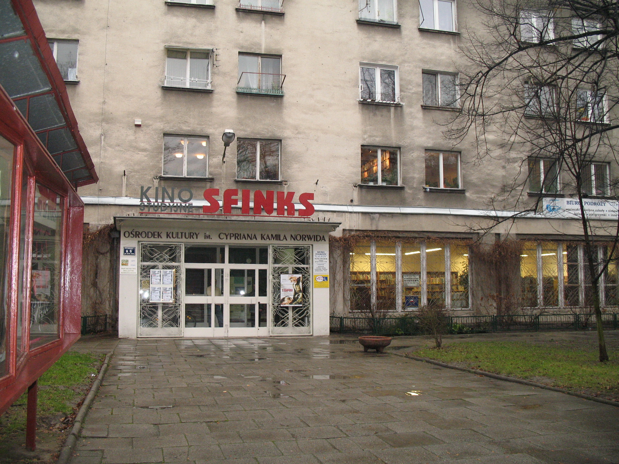 Kino Sfinks na Osiedlu Górali w Krakowie.